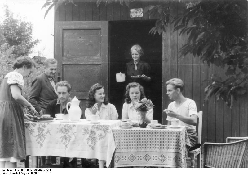 Illus / Blunck Erntezeit im Schrebergarten. UBz: Hier verteilt die Hausfrau den Sonntagskuche, im Garten und frischer Luft schmeckt er noch einmal so gut. 1981-48 ADN-ZB/Archiv Berlin 1948: Sonntagsvergnügen bei Kaffee und Kuchen im Schrebergarten (Aufn.: Blunck) 1981-48